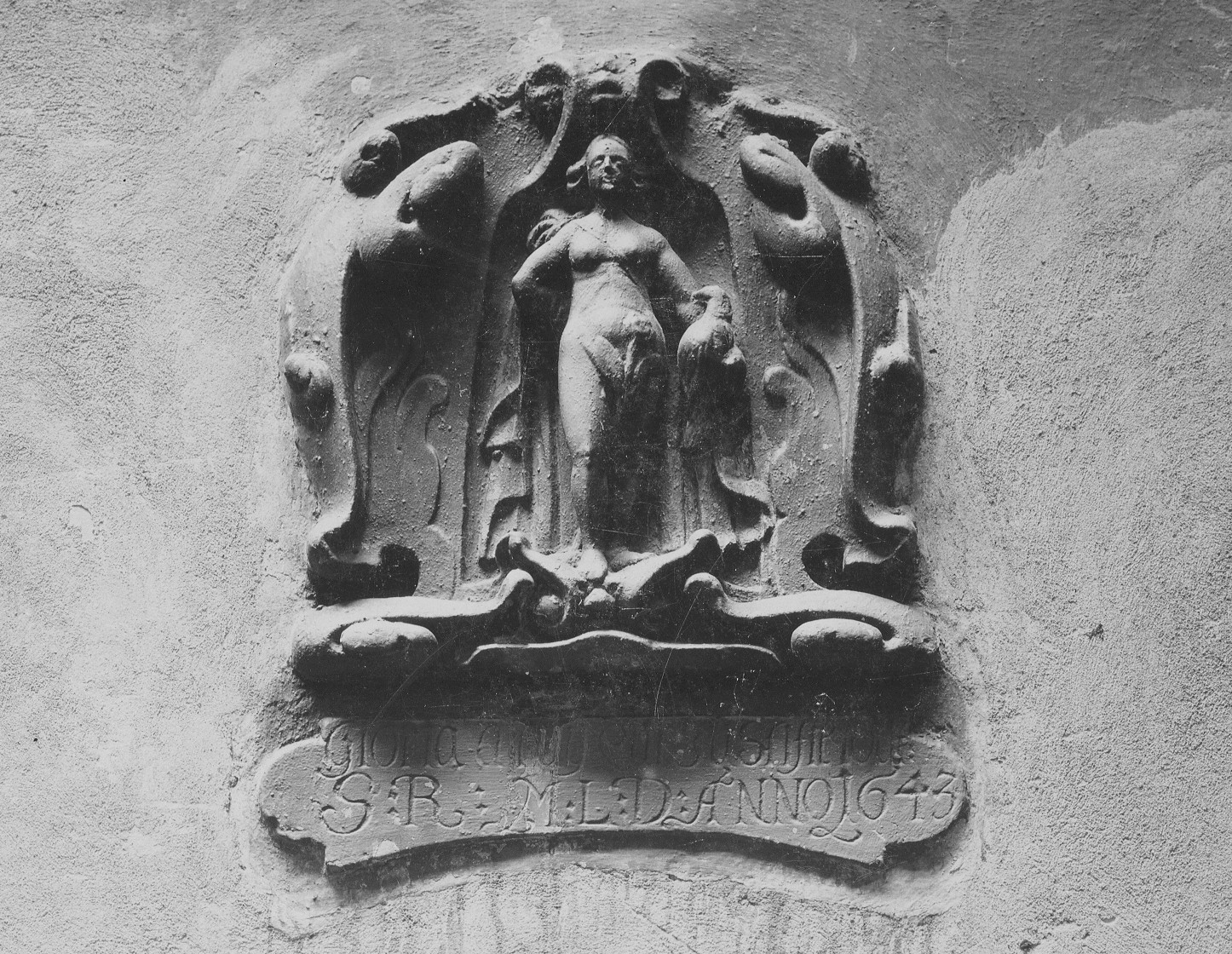 Bostadshuset "Thispe 4", Gamla stan, Rosenbergska Huset. En portalsten visande en kvinnogestalt med örn och texten ”S:R M:L:D Anno 1643”. Vid 1600-talets mitt ägdes fastigheten Thisbe 4 av krigsrådet Simon Rosenberg och hans hustru Margaretha Larsdotter, deras initialer återfinns på portalstenen.